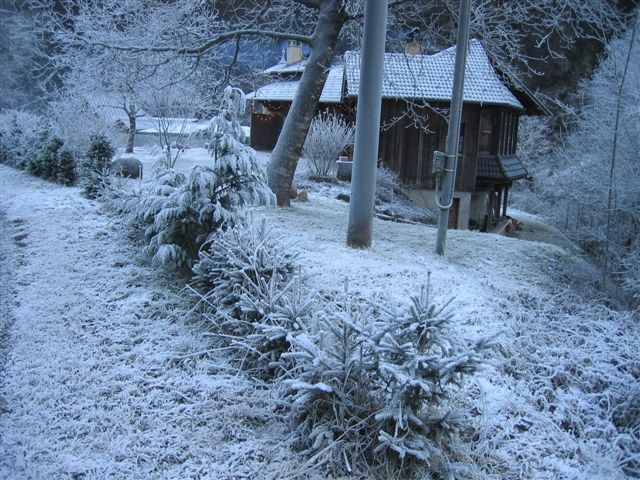 Cassilgio